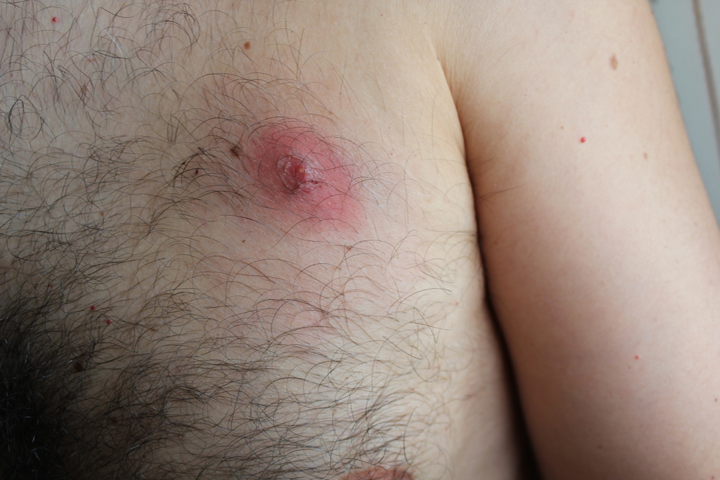 Furúnculo limpiado de pus